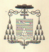 Blason de Template:Mgr Verolino